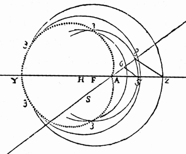 Oval de tercera classe a la Geometria de Descartes